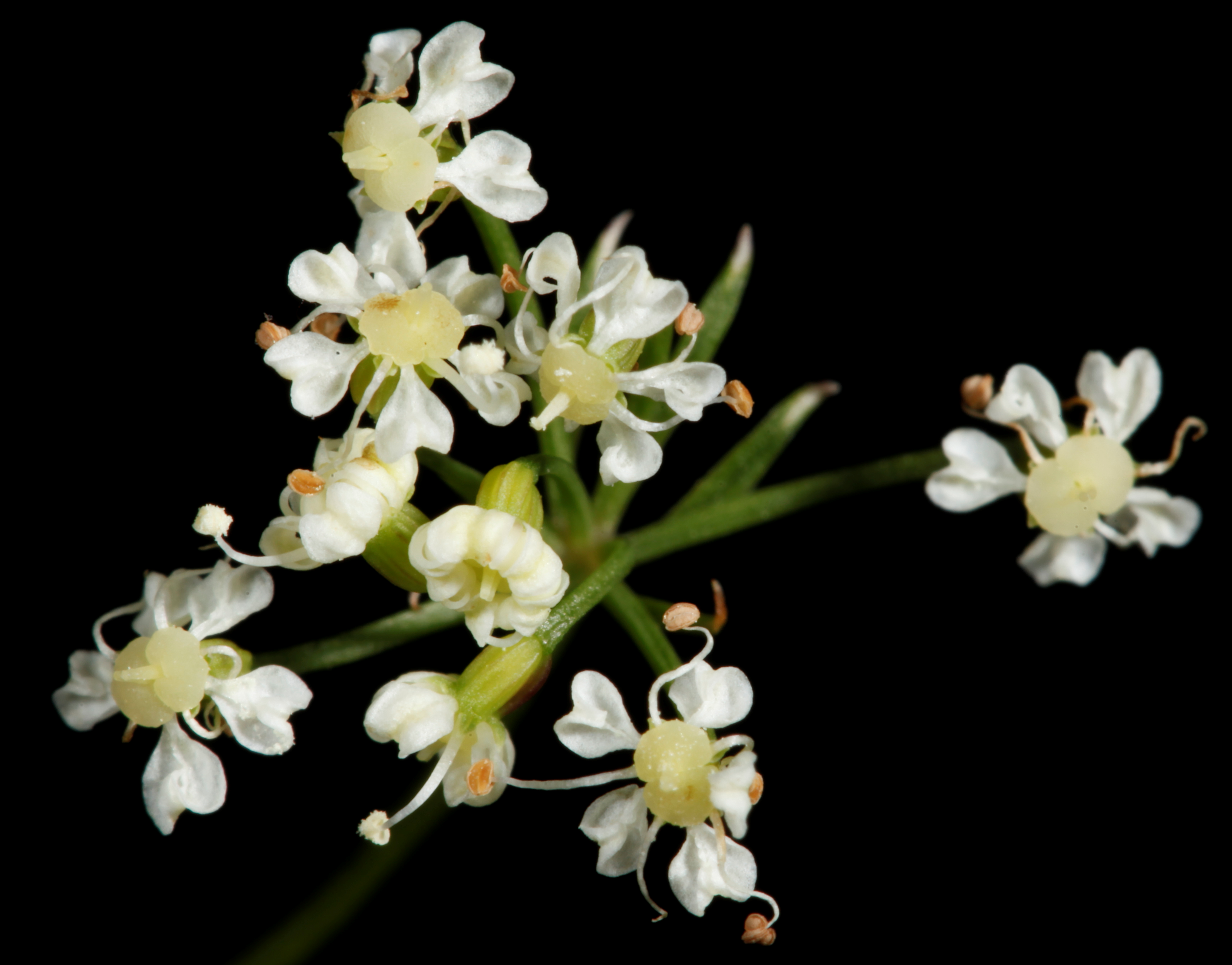 Rivasmartinezia